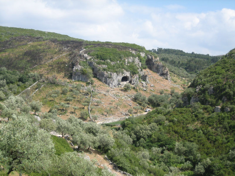 Buracas do Casmilo, Furadouro, Condeixa-a-Nova, Portugal Formação Geológica